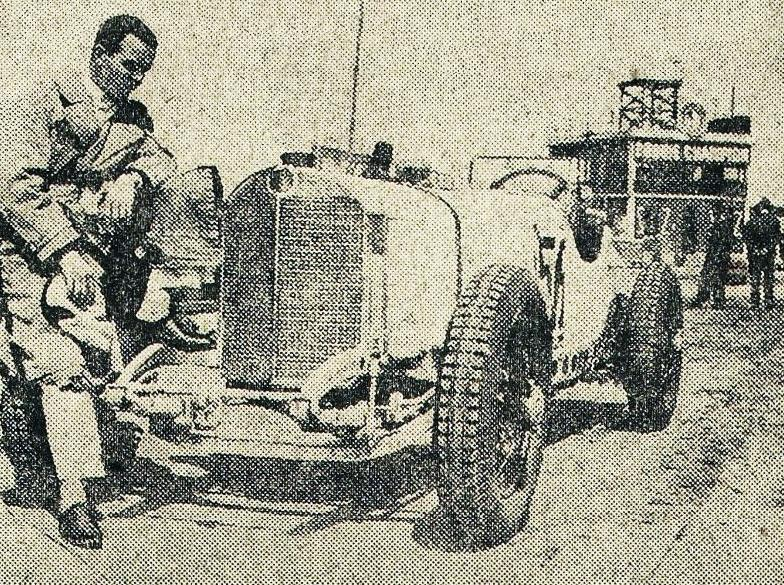 Rudolf Caracciole sur Mercedes, au Grand Prix de l'ACF 1931.